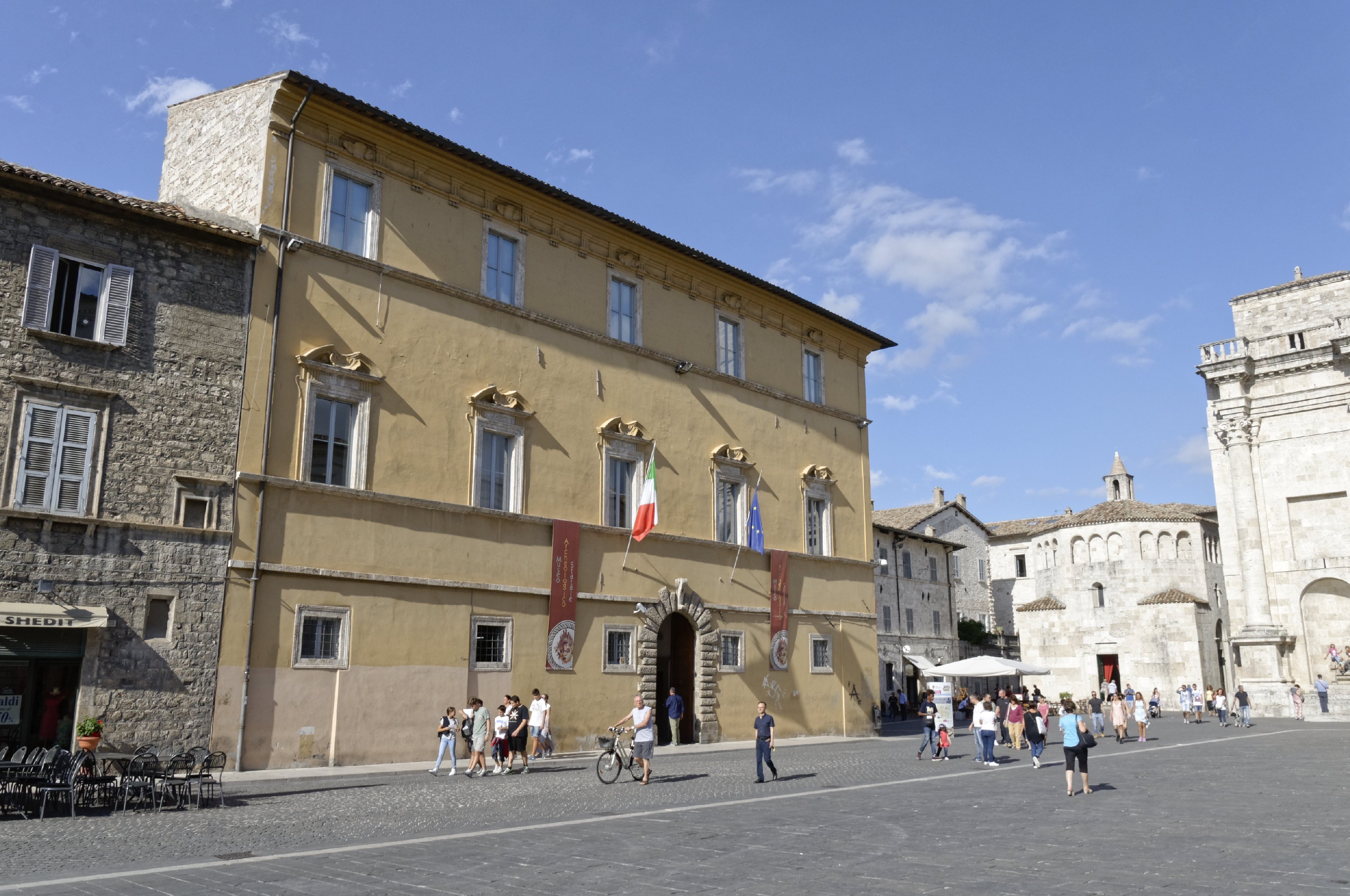 Ascoli Piceno 2015 Dieses Foto entstand in Zusammenarbeit mit Stadtbesichtigungen.de Die Seiten Stadtbesichtigungen.de, der dazugehörige Reise Blog sowie die Facebookseite: Stadtbesichtigungen Rom dürfen dieses Bild für Ihre Veröffentlichungen ohne den Hinweis auf Wikipedia, Commons bzw der Lizenz verwenden. Die Verantwortlichen habe von mir (Ra Boe) die Originaldaten zur freien Verfügung übermittelt bekommen.